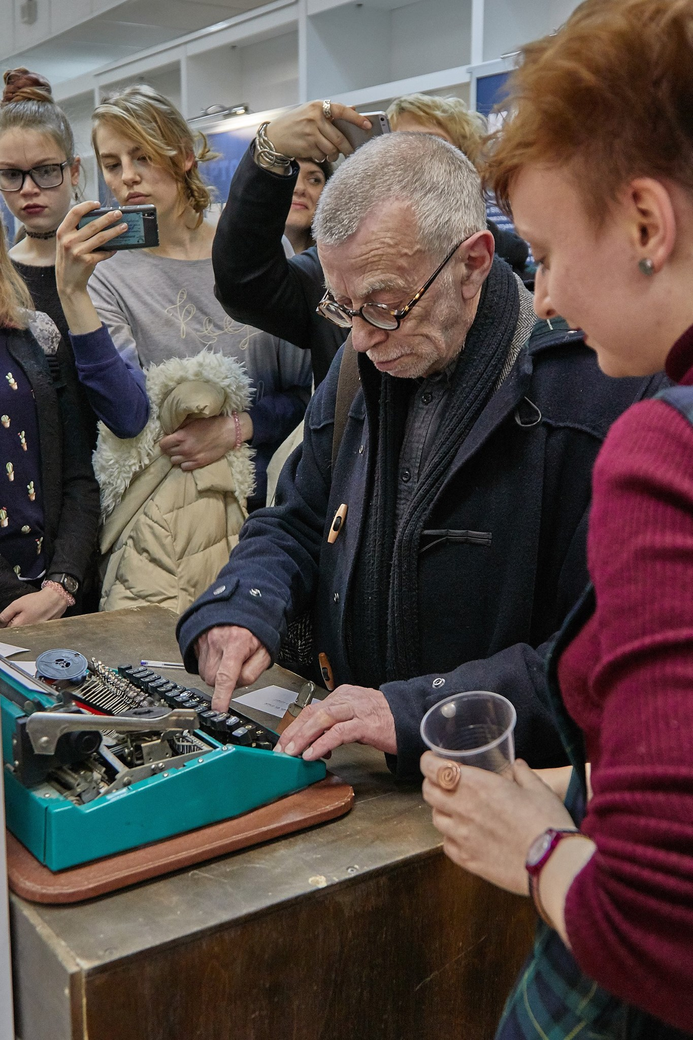 Выставочный проект «Карточки». Лев Рубинштейн. Библиотека им. Н.А.Некрасова